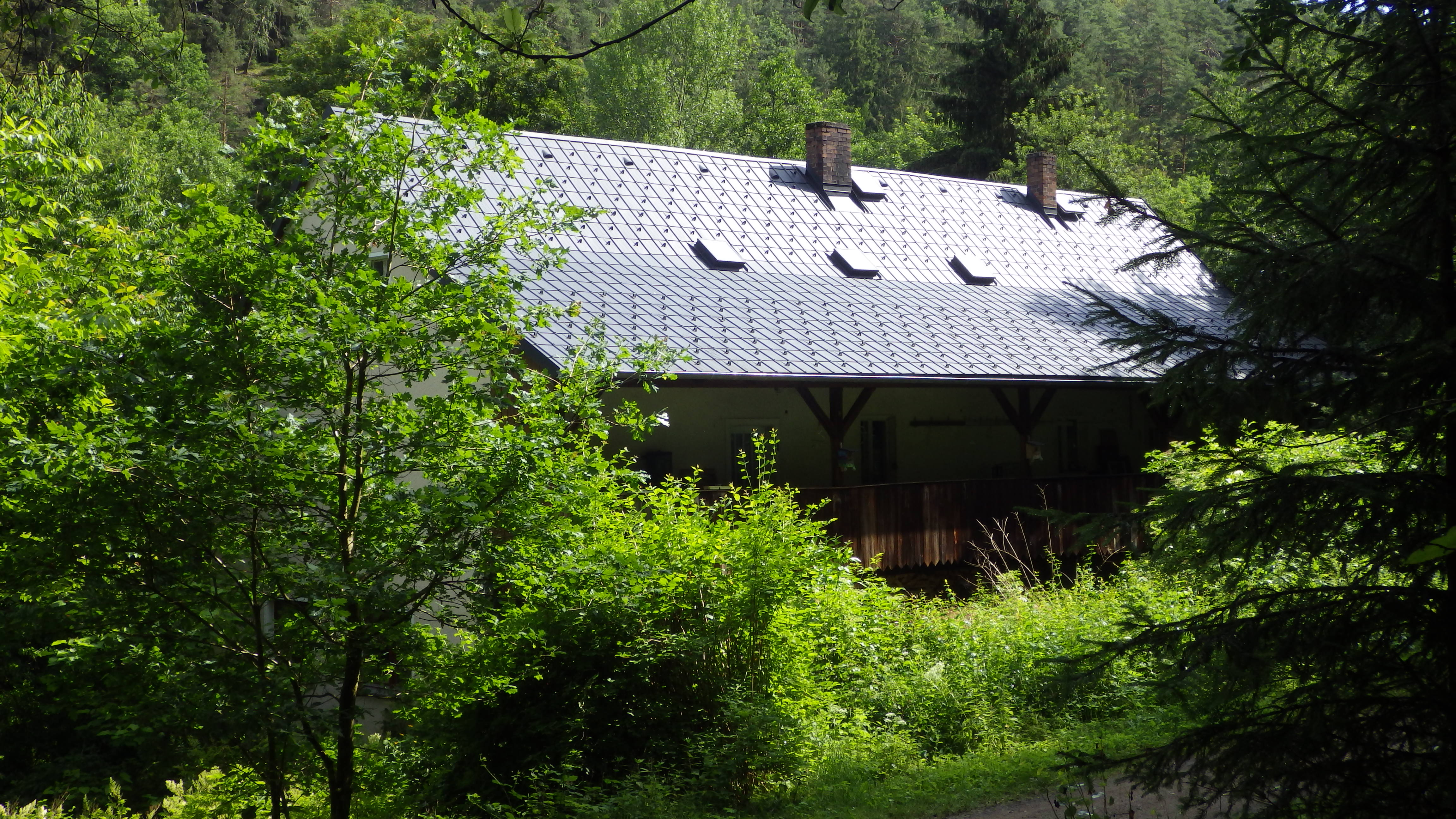 Schleif- und Polierwerk Frankenthal